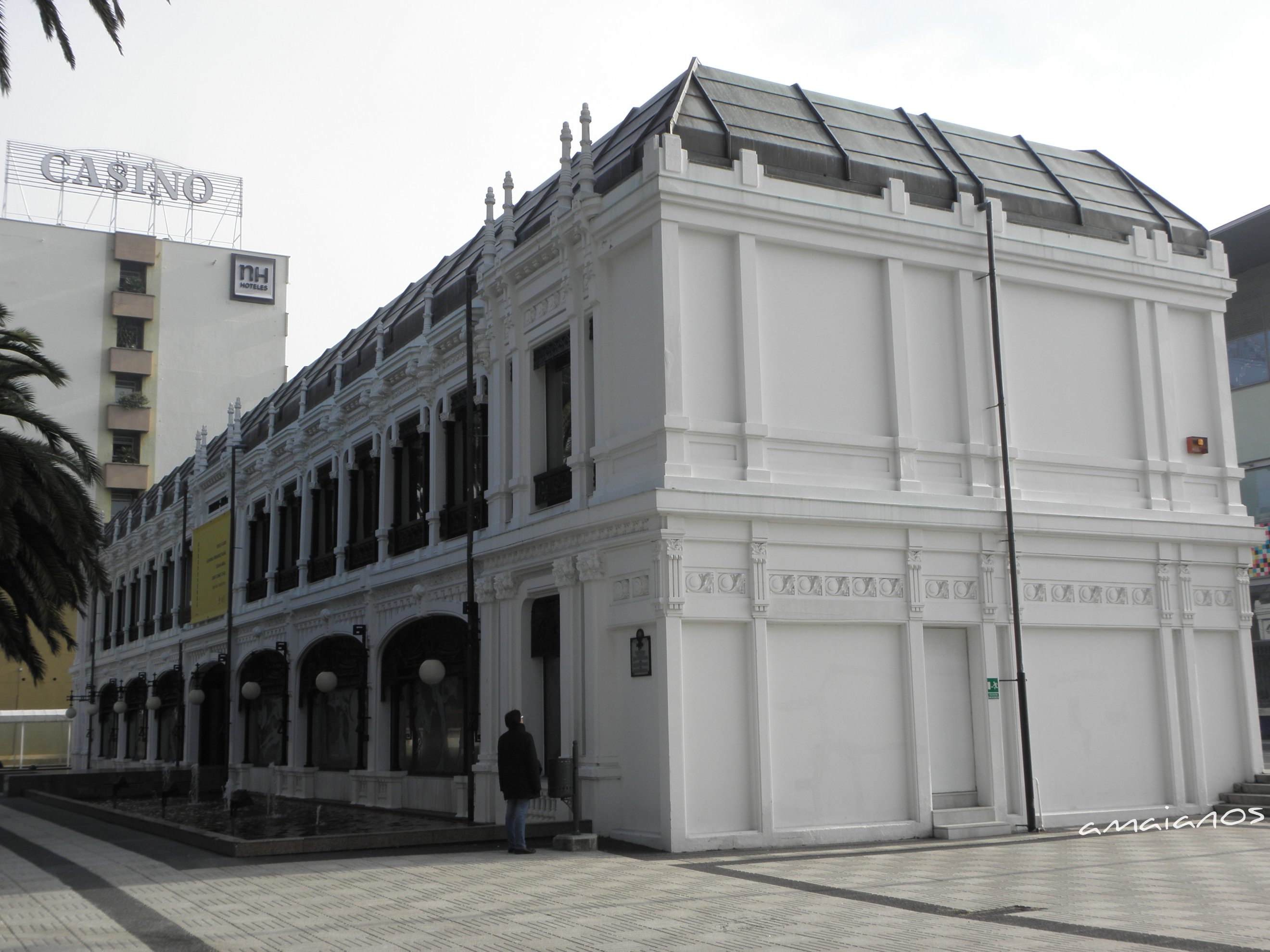 Kiosko Alfonso, A Coruña